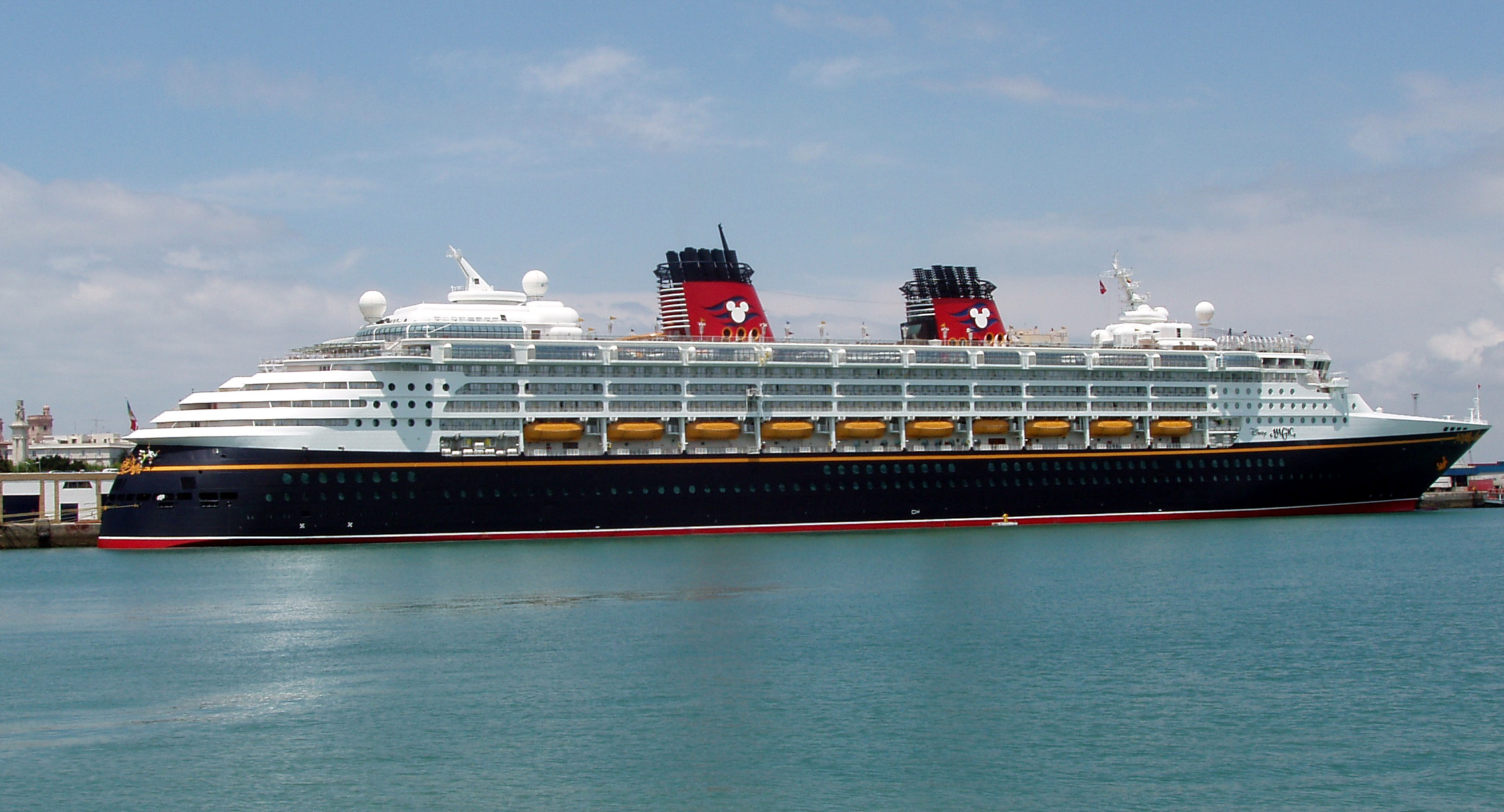 Disney Magic, crucero turístico, 297 m de eslora, bandera de Bahamas, en el Puerto de Cádiz, España